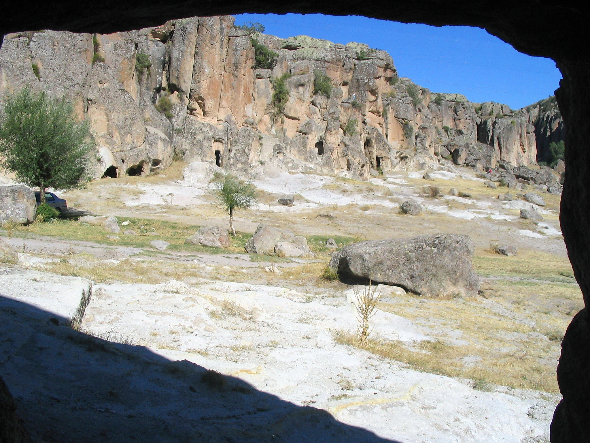 Kirchen und Klosterräume im Klostertal bei Güzelyurt, Kappadokien, Zentraltürkei